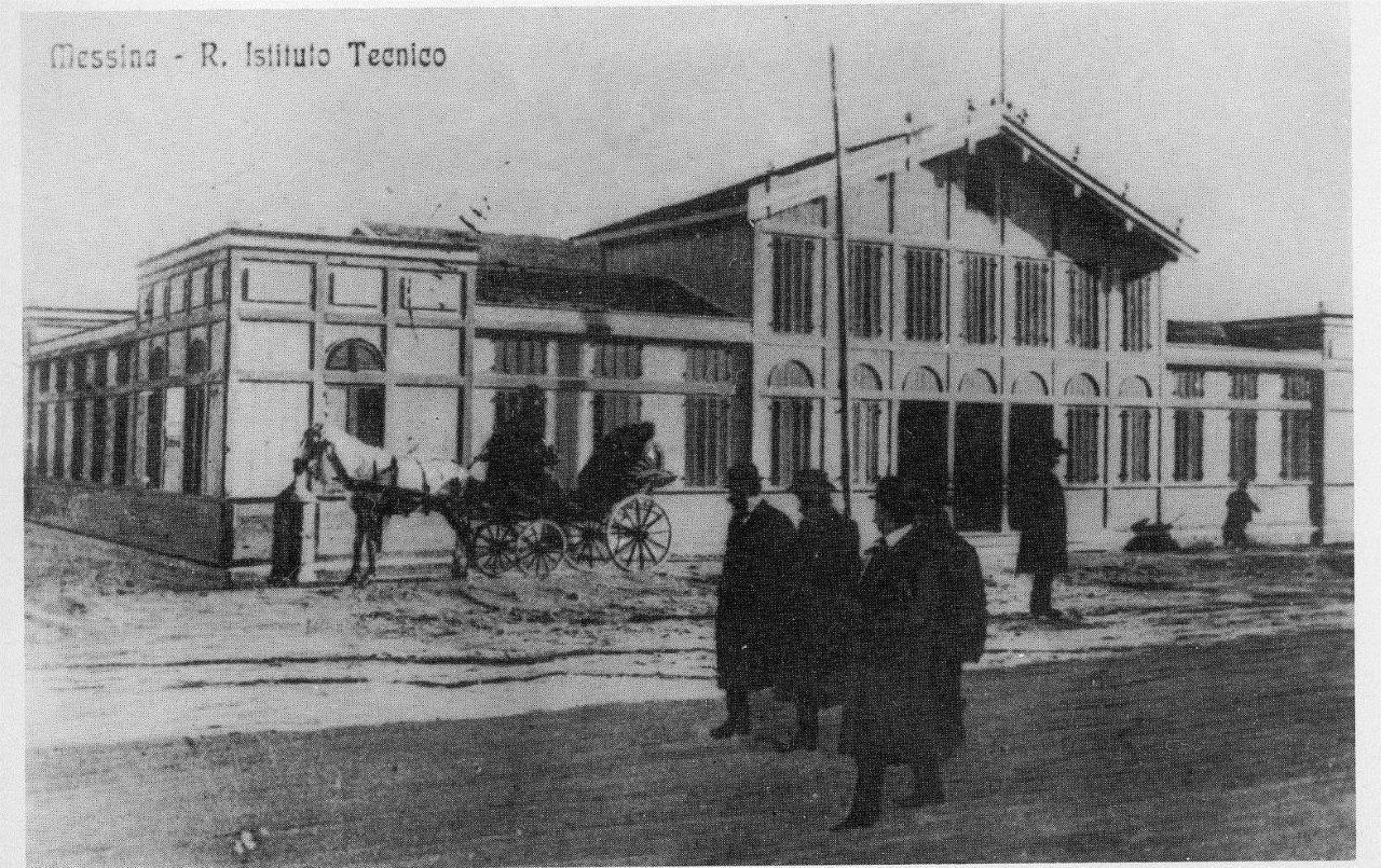 la foto ritrae l'istituto tecnico Jaci di Messina